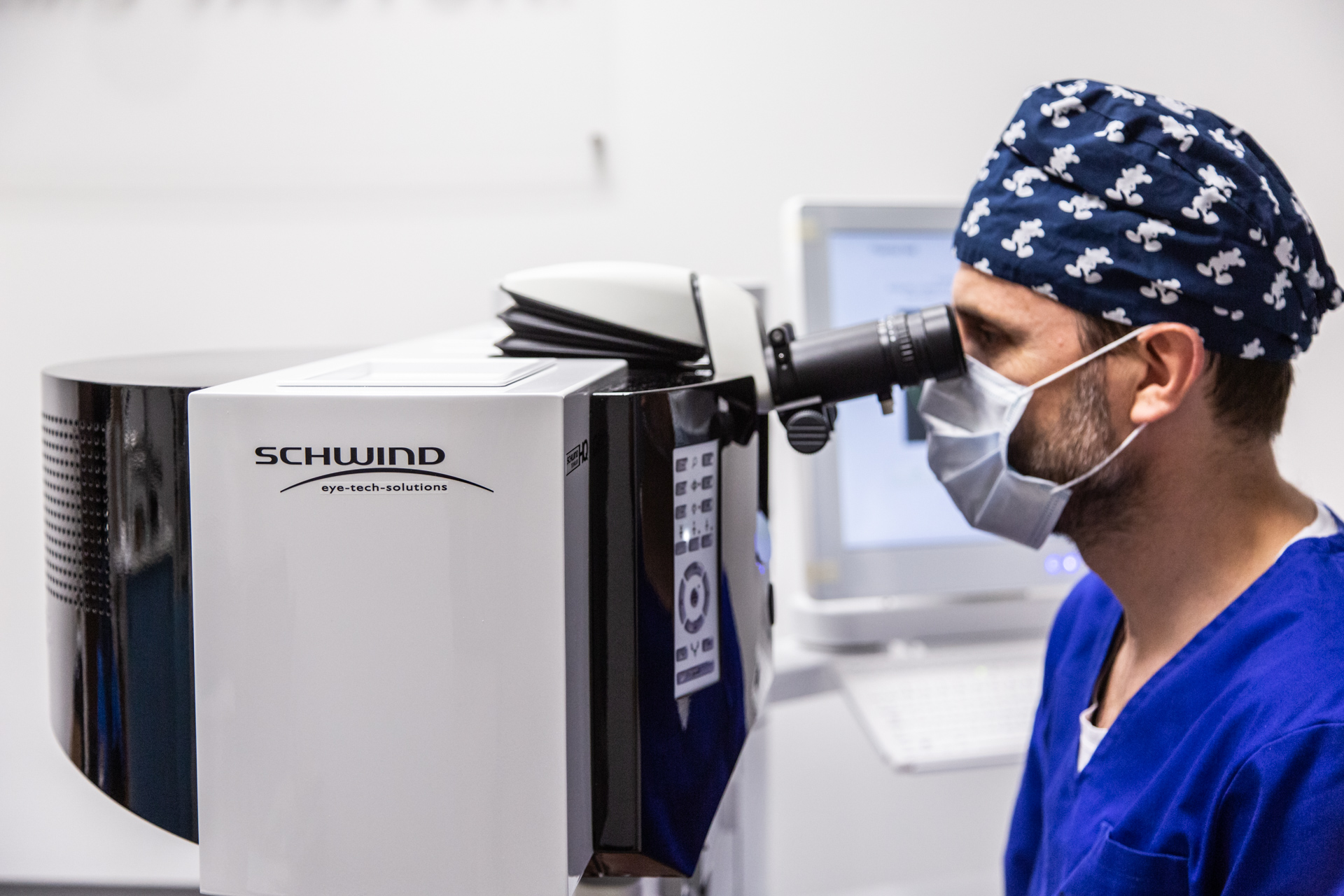 Operatőr lézeres szemműtét közben a mikroszkópon keresztül követi az operációt. A fájl által ábrázolt elemek: Schwind Amaris 1050RS excimer lézer mikroszkópja. Helyszín: Budai Szemészeti Központ, 1126 Budapest, Tartsay Vilmos utca 14.